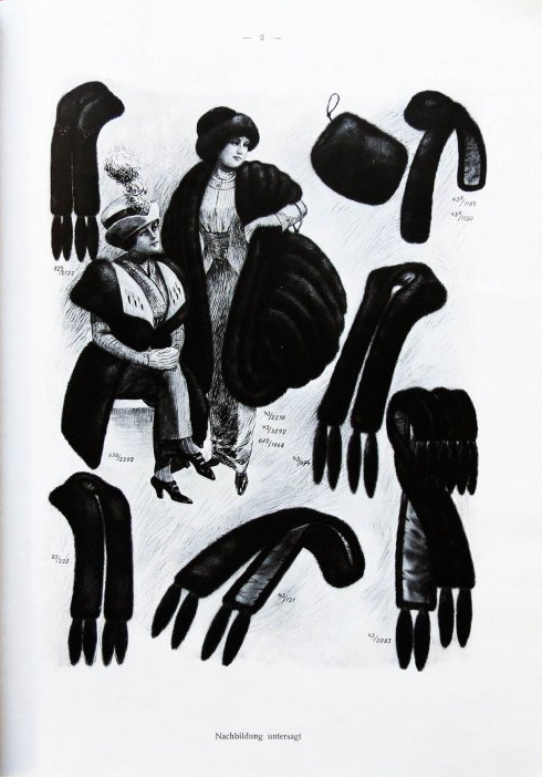 Pelzwaren Wolf (Pelzkonfektion Arthur Wolf), Berlin, Katalog 1912-1913. Circa 31 x 22,7 cm. 26 Seiten und 13 doppelseitig illustrierte Tafeln. Katalog der Firma für Pelzbekleidung mit Mänteln, Hüten Besatz, Schals, Krawatten etc. Unter anderem: Seeotter-Murmel, Hermelin, Maulwurf, Zobel, Marder, Persianer, Astrachan, Nerz, Skunk, Feh, Seal-Bisam, Hase, diverse Imitationen etc.